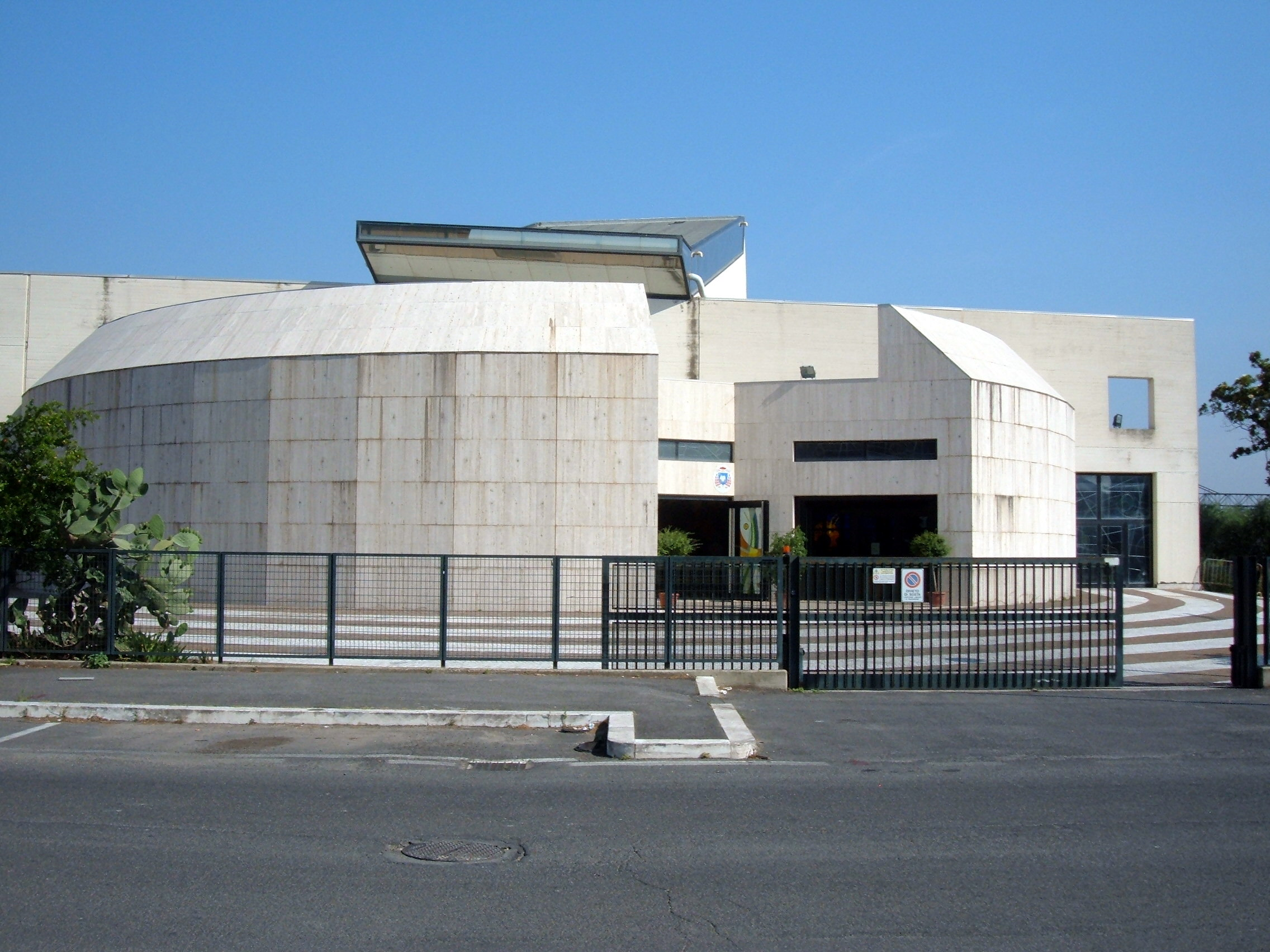 Chiesa dei Santi Aquila e Priscilla, a Roma, nel quartiere Portuense.